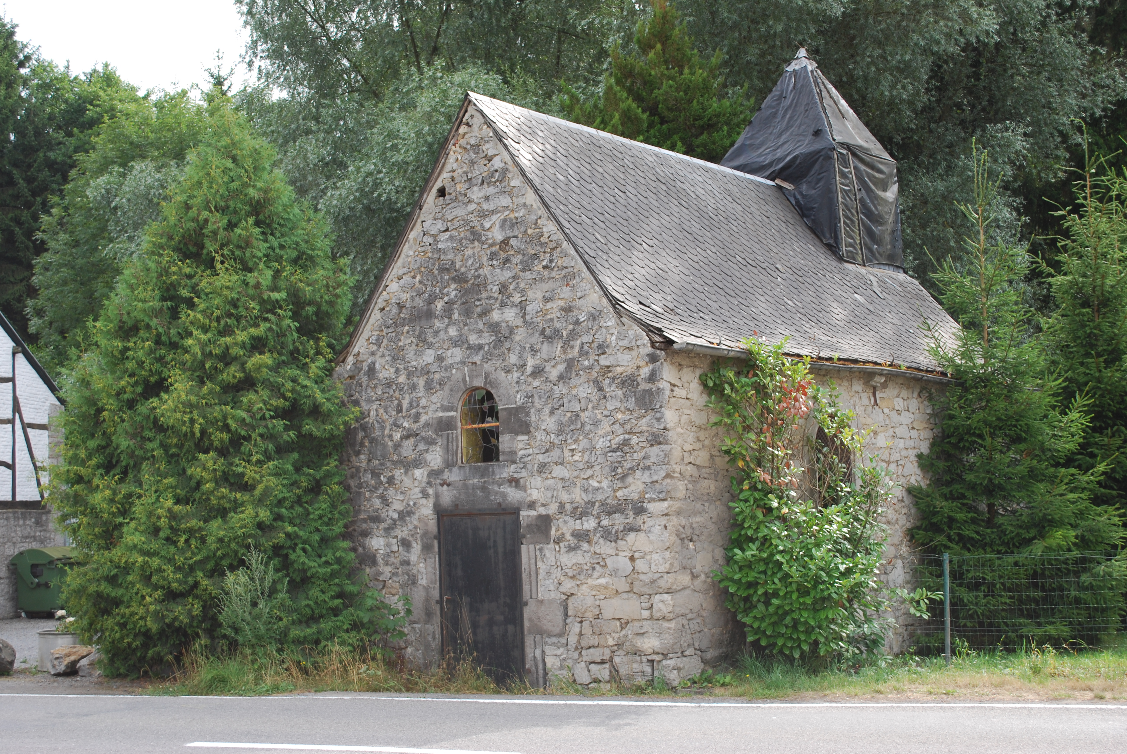 La chapelle Saint-Denis à Juzaine (Bomal).